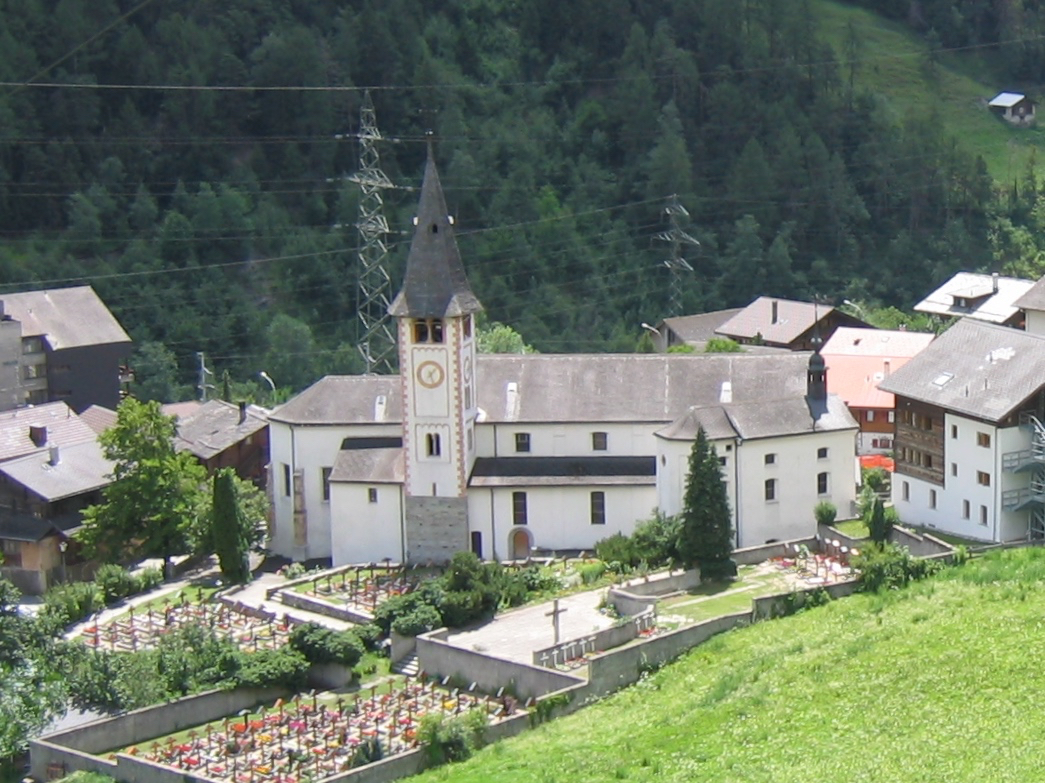 Pfarrkirche hl. Hilarius in Mörel (Gde. Mörel-Filet), Wallis, Schweiz. Neubau von Chor und Schiff sowie Umbau des Turmes durch Ulrich Ruffiner, 1529, 1546–1547.